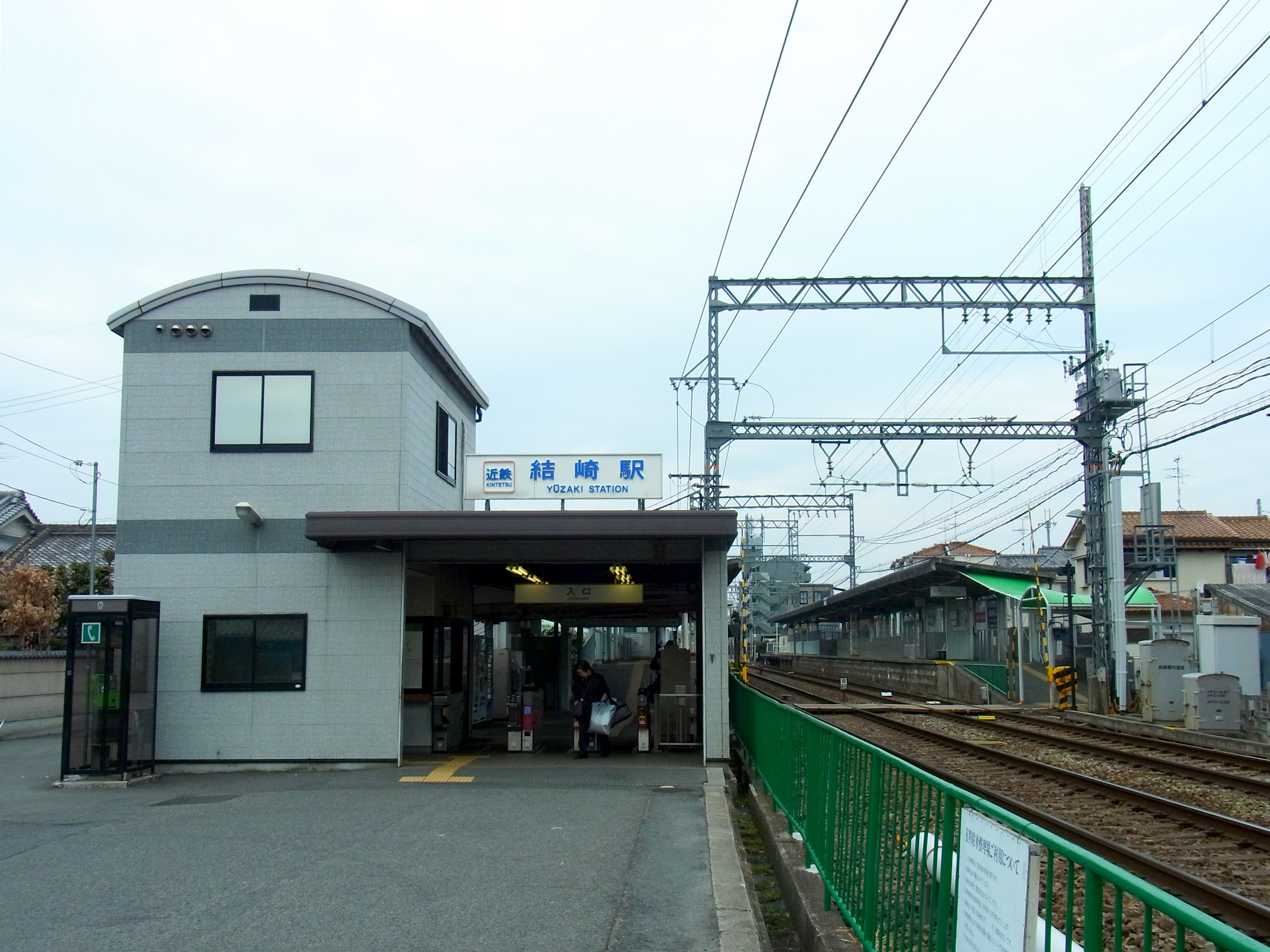 近鉄橿原線 結崎駅 Yūzaki station 2012.2.05